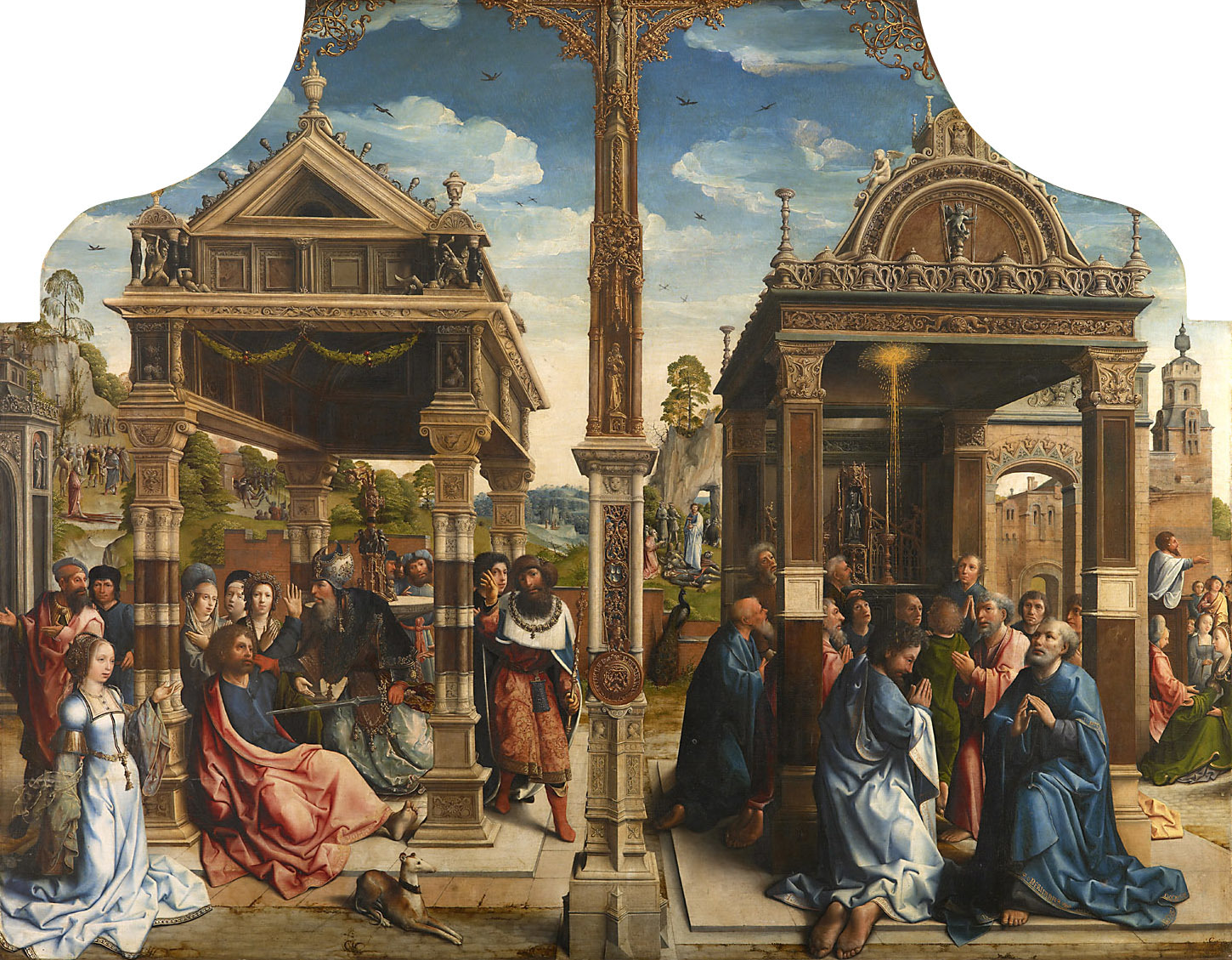 Mitteltafel eines Flügelaltares; links vorne: ein indischer Götzenpriester durchbohrt den hl. Thomas mit einem Schwert; im Hintergrund: der hl. Thomas geht über glühende Kohlen und wird in einen Ofen geschoben; rechts vorne: Wahl des Matthias zum Apostel; im Hintergrund: Predigt des Apostels, Überreichung des Giftbechers und Tode der Widersacher.